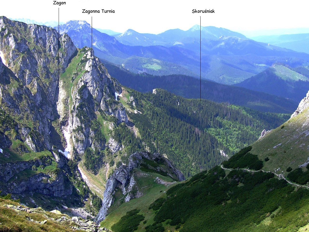 Zagonna Turnia i Zagon w Dolinie Małej Łąki. Widok ze stoków Giewontu